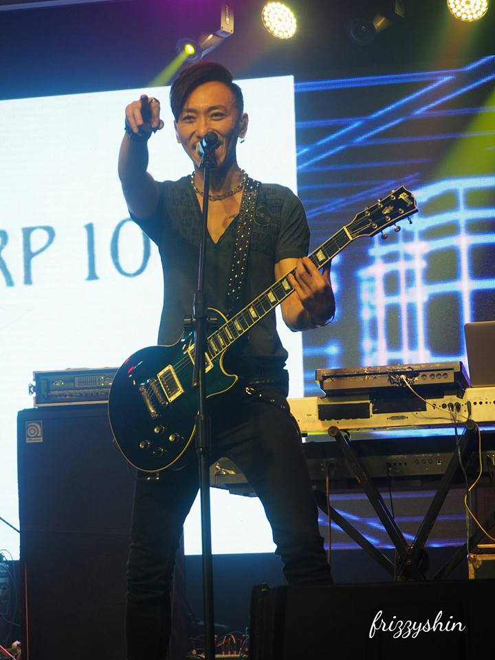 2015簡單承諾台北站